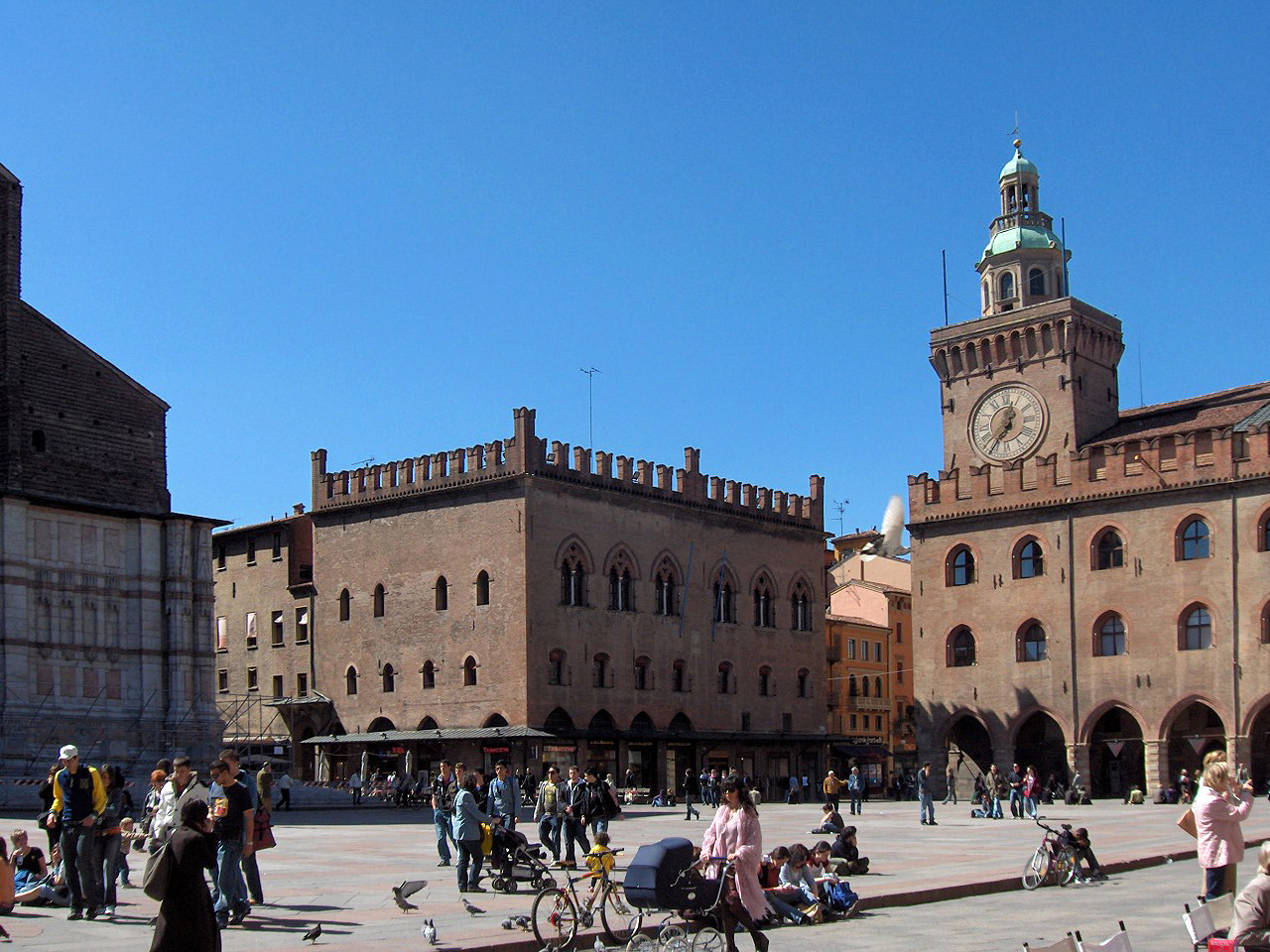 Palazzo dei Notai, Bologna, Italy